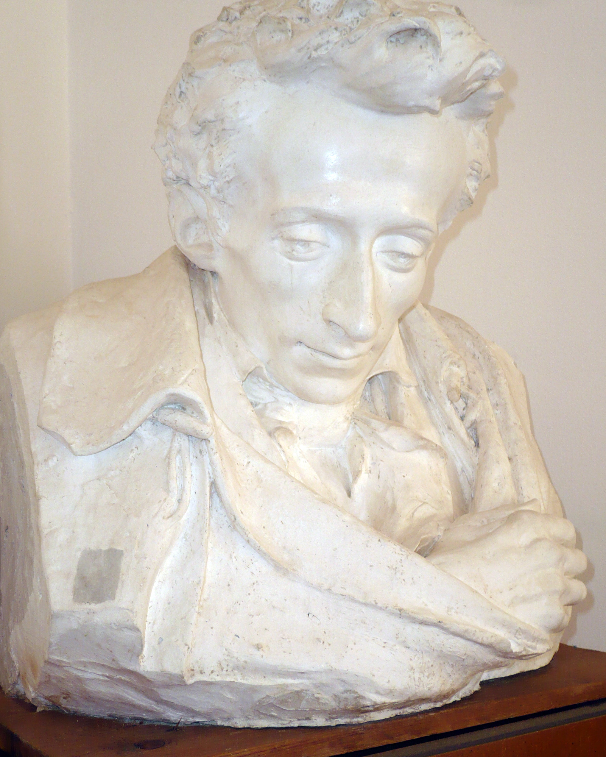 Busto del Leopardi op.1 in gesso esposto nel Museo Tripisciano di Palazzo Moncada a Caltanissetta